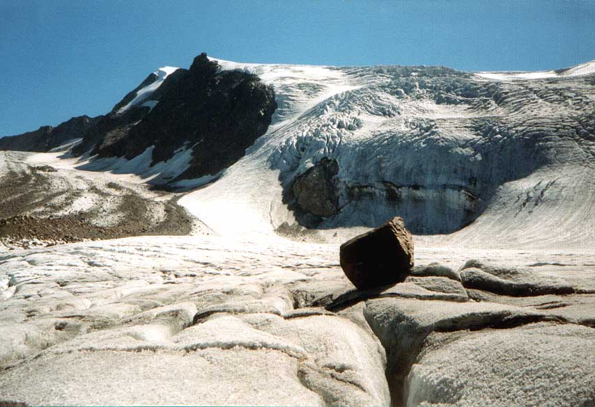 Blick vom Sulzenauferner zum Wilden Pfaff